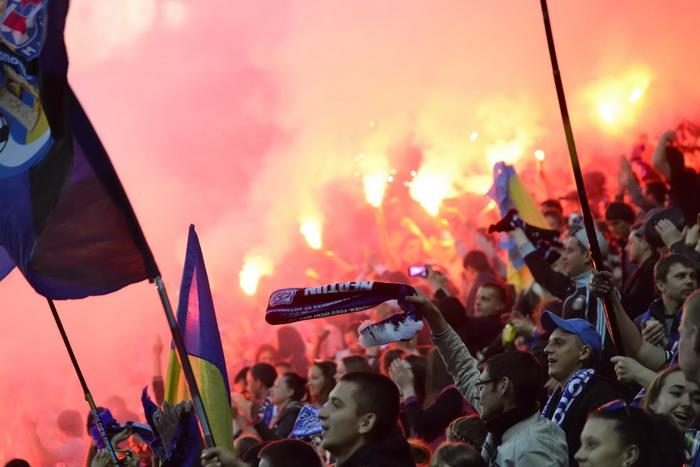 Фан-сектор одеського Чорноморця під час домашнього матчу з київським Динамо, 25 квітня 2014 року.